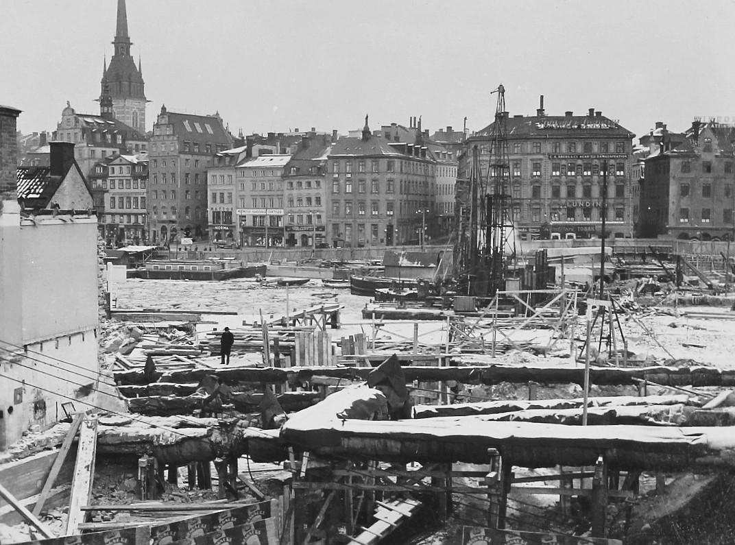 Karl Johansslussen under uppförandet. Pålkranens syns i bakgrunden.